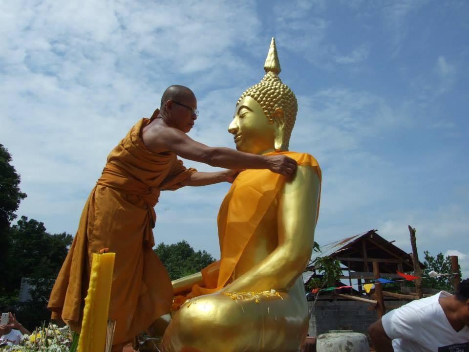 เป็นพระประธานกลางโดมลานธรรม